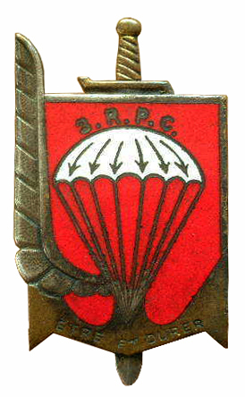 Insigne régimentaire du 3e Régiment de parachutistes coloniaux